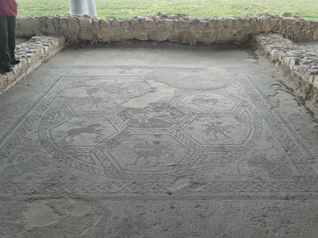 Pavimento a mosaico nella residenza